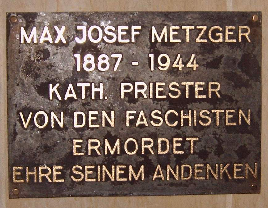 Gedenktafel für Max-Josef-Metzger in Magdeburg, Max-Josef-Metzger Straße, aufgenommen von Olaf2 am 5.1.2006